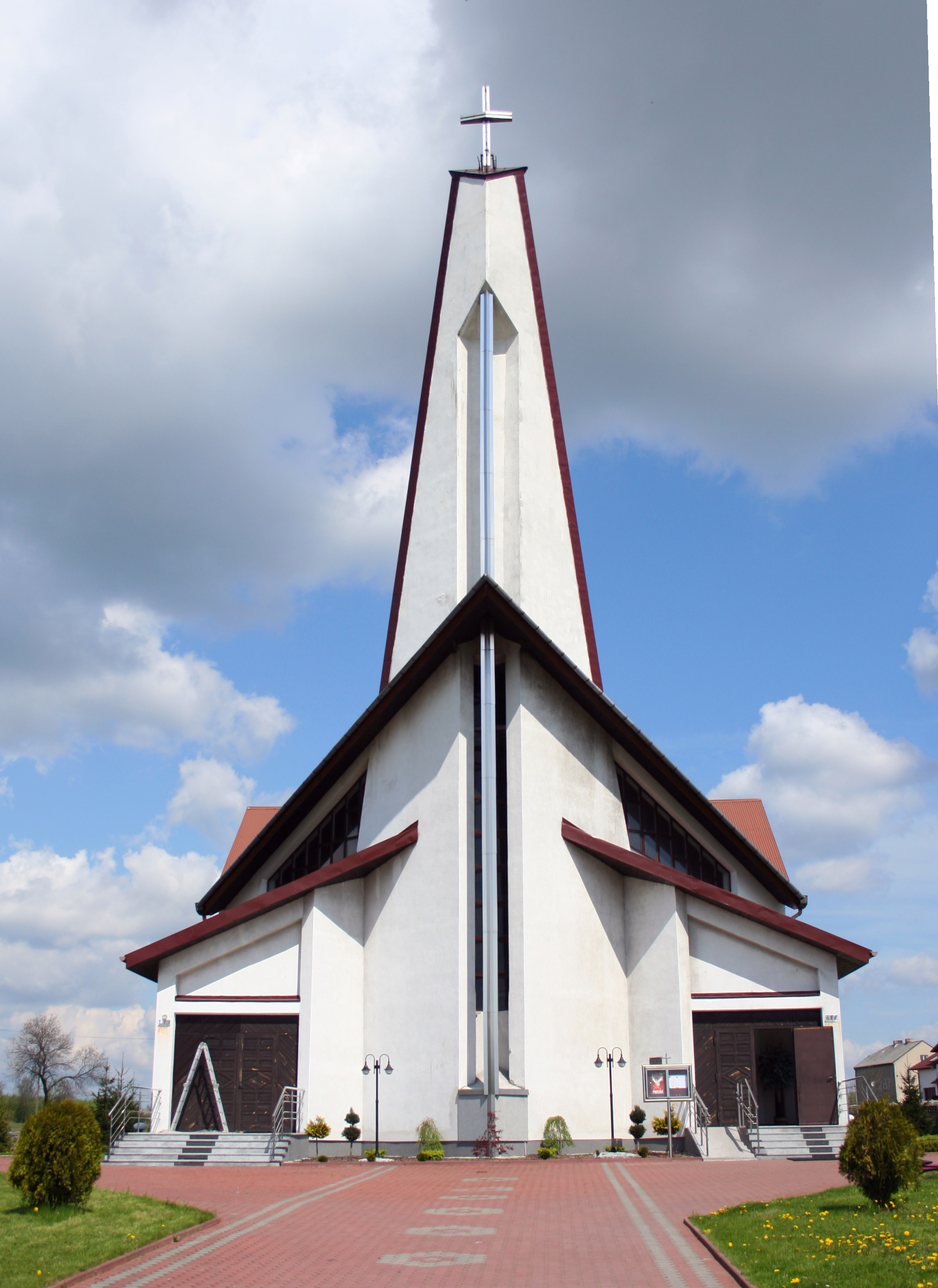 Gniazdów - rzymskokatolicki kościół parafialny pw. Najświętszego Serca Pana Jezusa